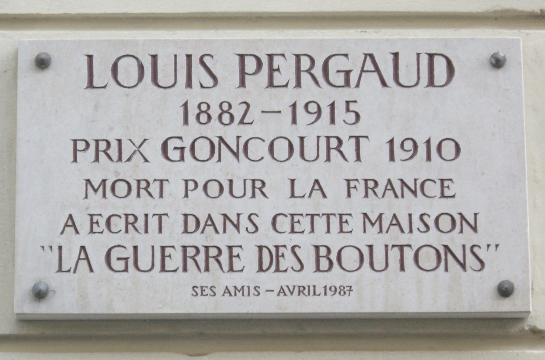 Plaque commémorative, 3 rue Marguerin, Paris 14e. « Louis Pergaud, 1882-1915, prix Goncourt 1910, mort pour la France, a écrit dans cette maison La Guerre des boutons. Ses amis — avril 1987. »